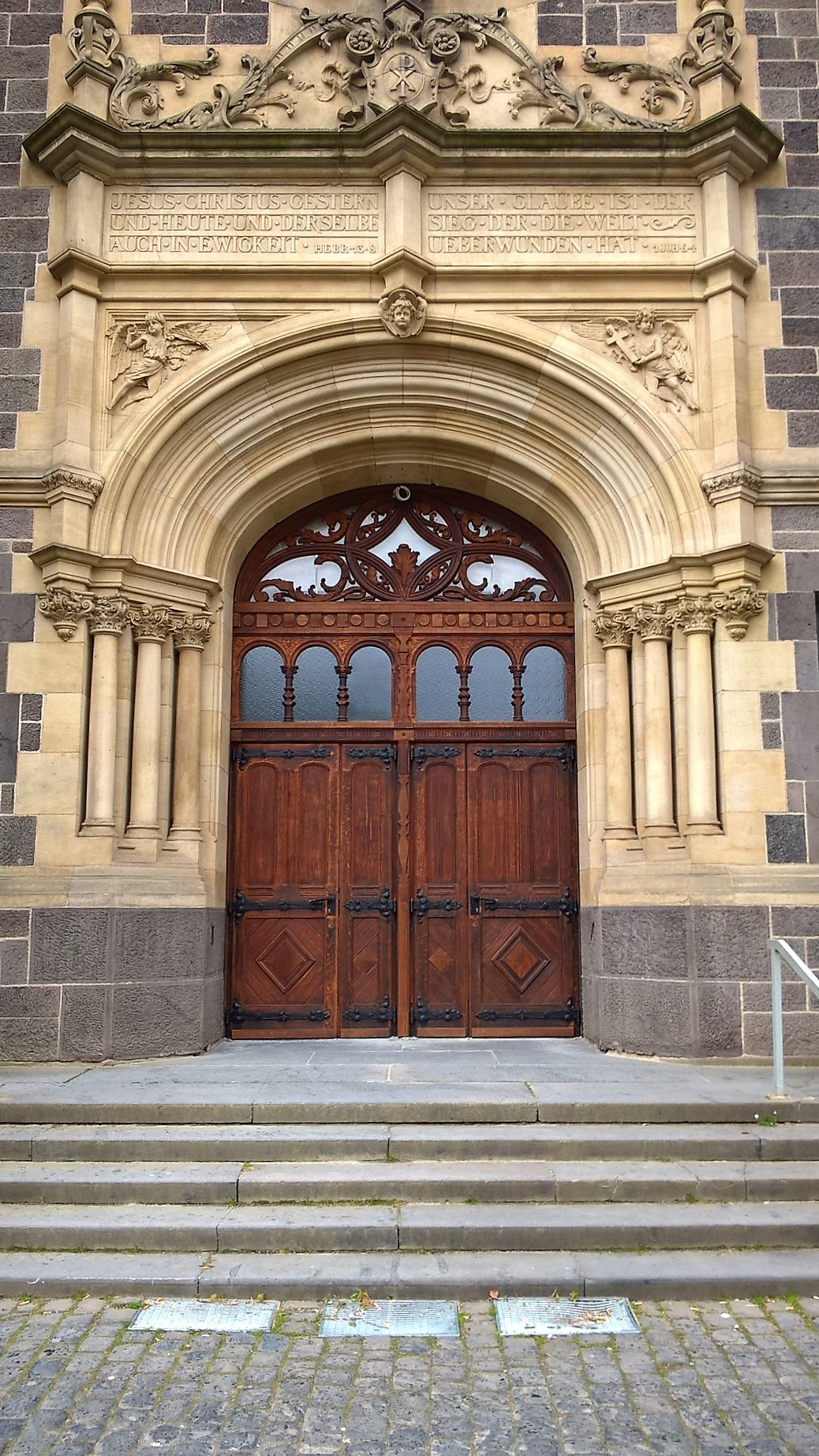 Hauptportal der Johanneskirche in Gießen, Hessen